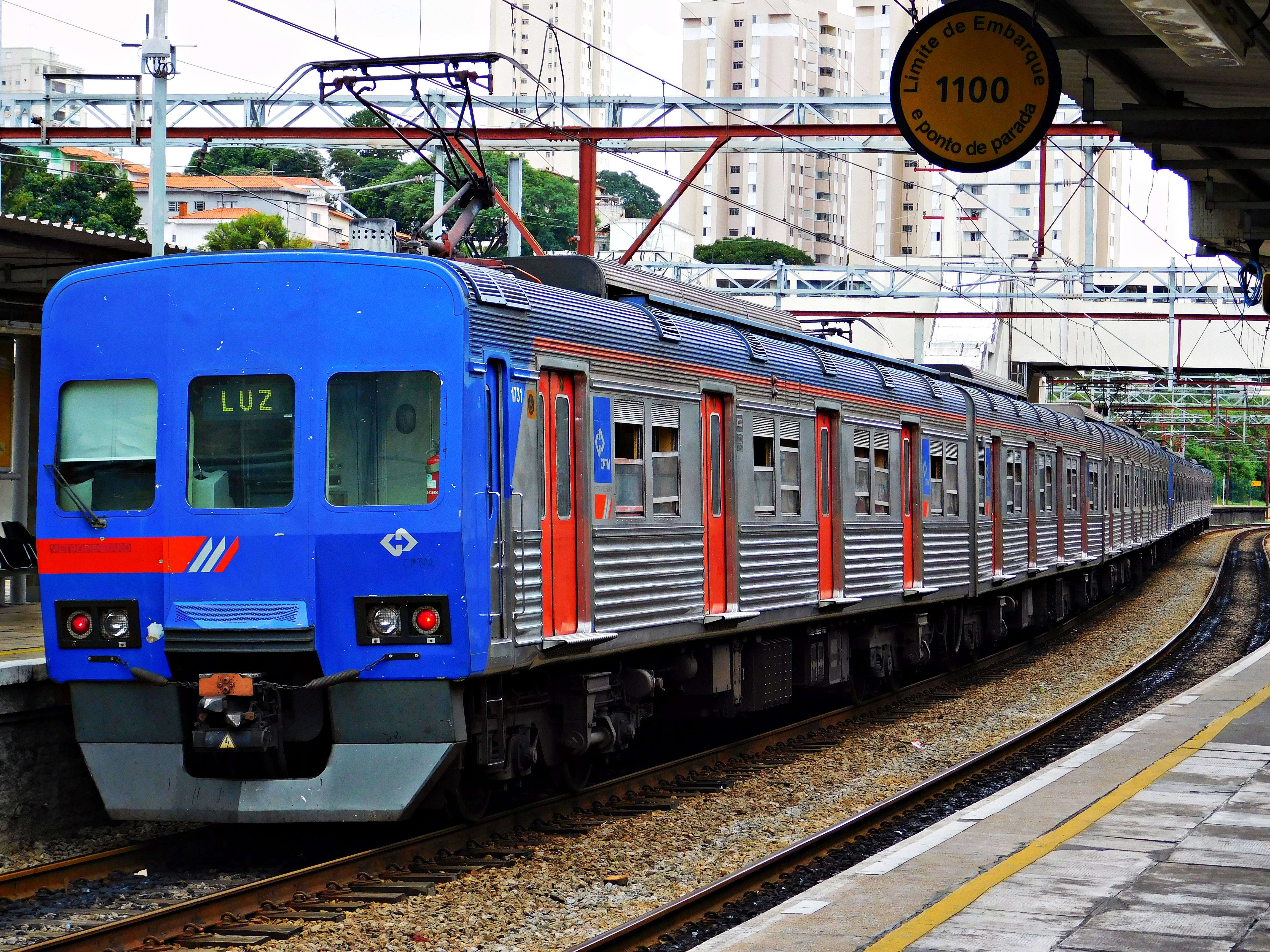 Composição G732 em Pirituba, sentido Luz.